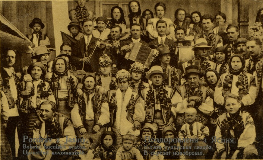 Дореволюционная открытка Российской империи из серии «Малороссийские типы».